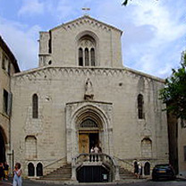 Cathedrale de Grasse